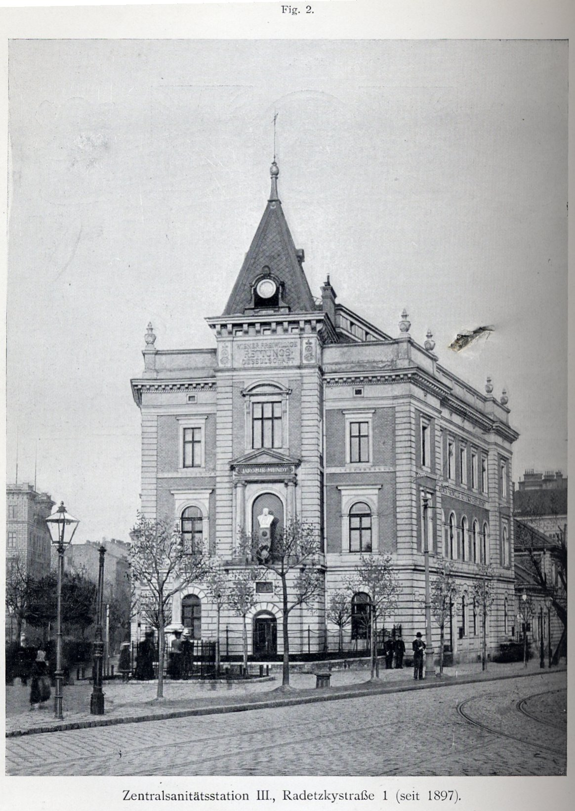 Wien, Zentralsanitätsstation Radetzkystraße